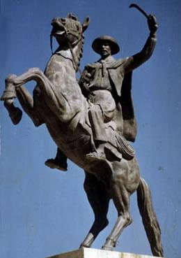 Estatua ecuestre de Eustaquio Méndez This medium shows the protected monument with the number T/00-003 in Bolivia.